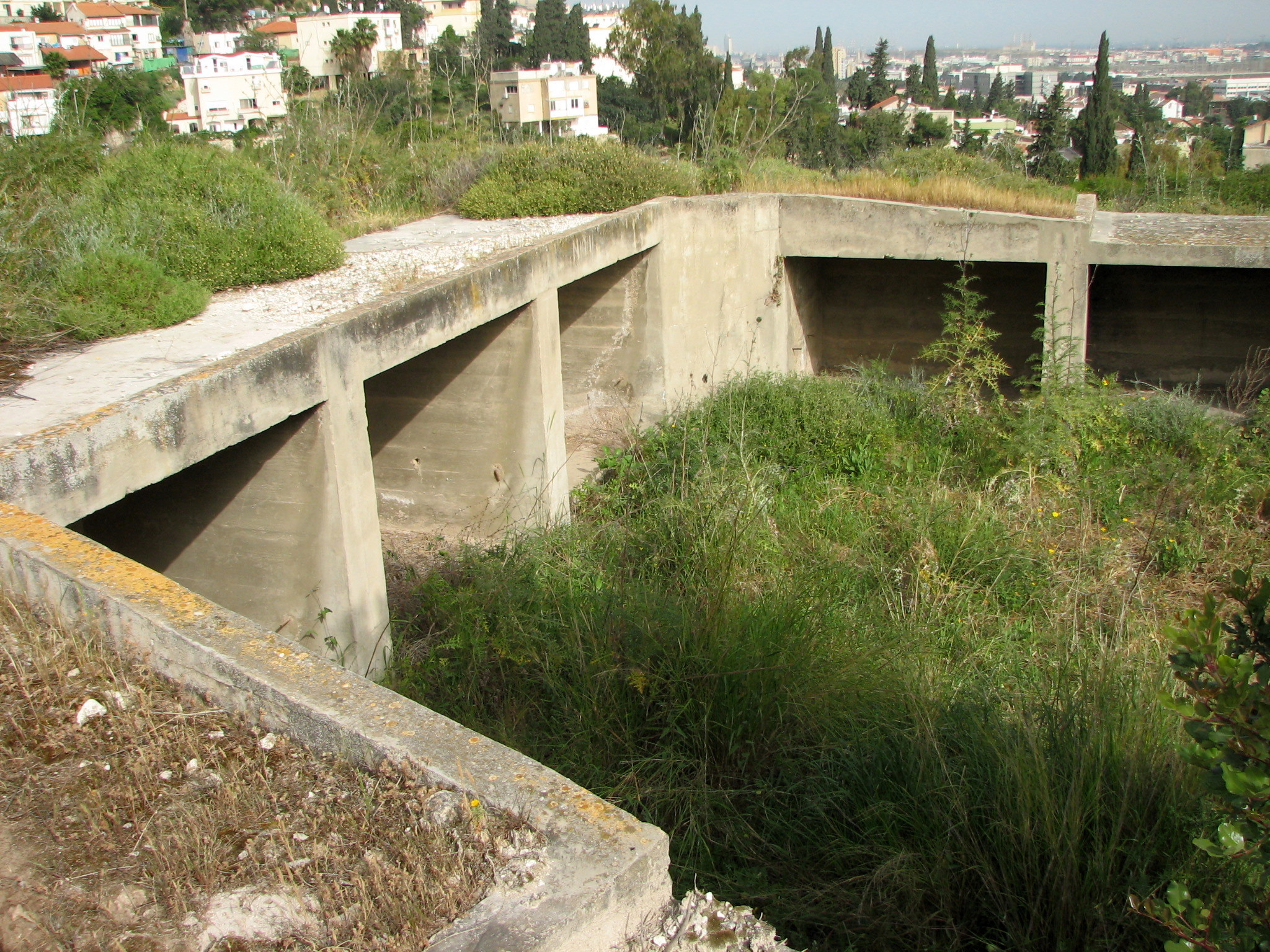 Nesher Old Quarry belongs to "Nesher Israel Cement Enterprise". Was opened on 1925 and closed on 1942. The quarry was reconstructed. Now in the city Nesher המחצבה הישנה של נשר מפעלי מלט ישראליים נפתחה בשנת 1925 ונסגרה בשנת 1942 לאחר שמקורות אבן הסיד התדלדלו. המחצבה עברה שיקום המשך השנים. בטח המחצבה מספר בארות ששימשו את בית החרושת ואת היישוב נשר בשנותיו הראשונות ביצורים מתקופת המנדט הבריטי